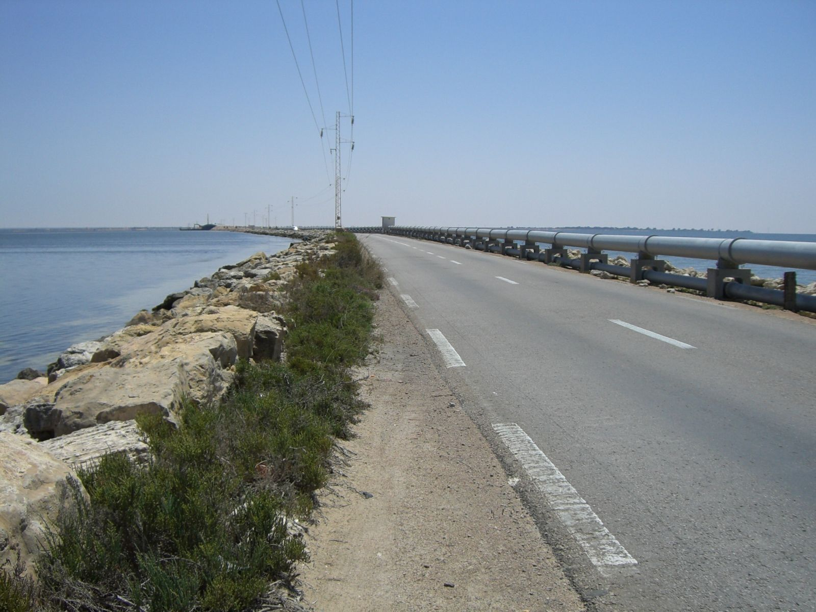 Dies ist der Römerdamm der Djerba mit dem tunesischen Festland verbindet. / This is the roman causeway